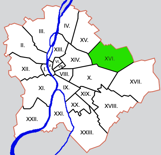 Budapest kerületei: XVI. kerület